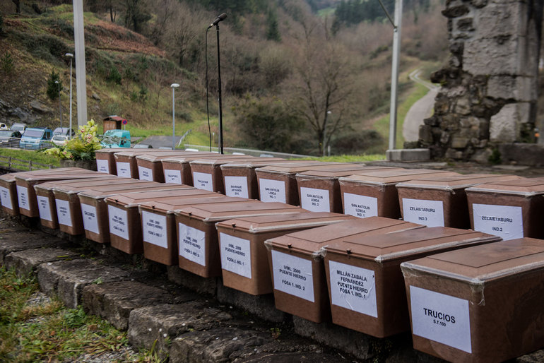 Inhumación en el Columbario de la Dignidad de Elgoibar de los restos de 24 personas desaparecidas en la Guerra Civil (21 de ellas sin identificar), hallados en las exhumaciones de fosas que ha llevado a cabo estos últimos años el Gobierno Vasco junto con la Sociedad de Ciencias Aranzadi. El acto ha servido para recordar a las personas desaparecidas en la Guerra Civil y para honrar su memoria. La inhumación ha corrido a cargo de familiares de Ramón Portilla, combatiente de la CNT, representantes de los ayuntamientos de Bilbao, Donostia, Etxebarria, Galdames, Larrabetzu, Legutio, Lemoa y Trucios, municipios en los que se hallaron las fosas, así como por representantes de la CNT, ya que dos de las personas identificadas pertenecían a esta organización. Todos ellos han ido depositando una a una las urnas en los nichos del Columbario de la Dignidad, situado en las inmediaciones del Cementerio Olaso de Elgoibar.